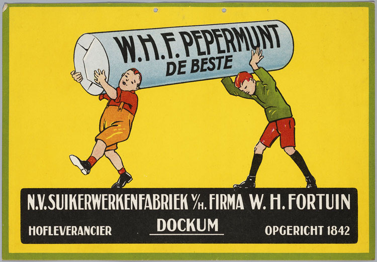 Reclamekaart: W.H.F Pepermunt de beste. N.V Suikerwerkenfabriek v/h W.H Fortuin. Dockum